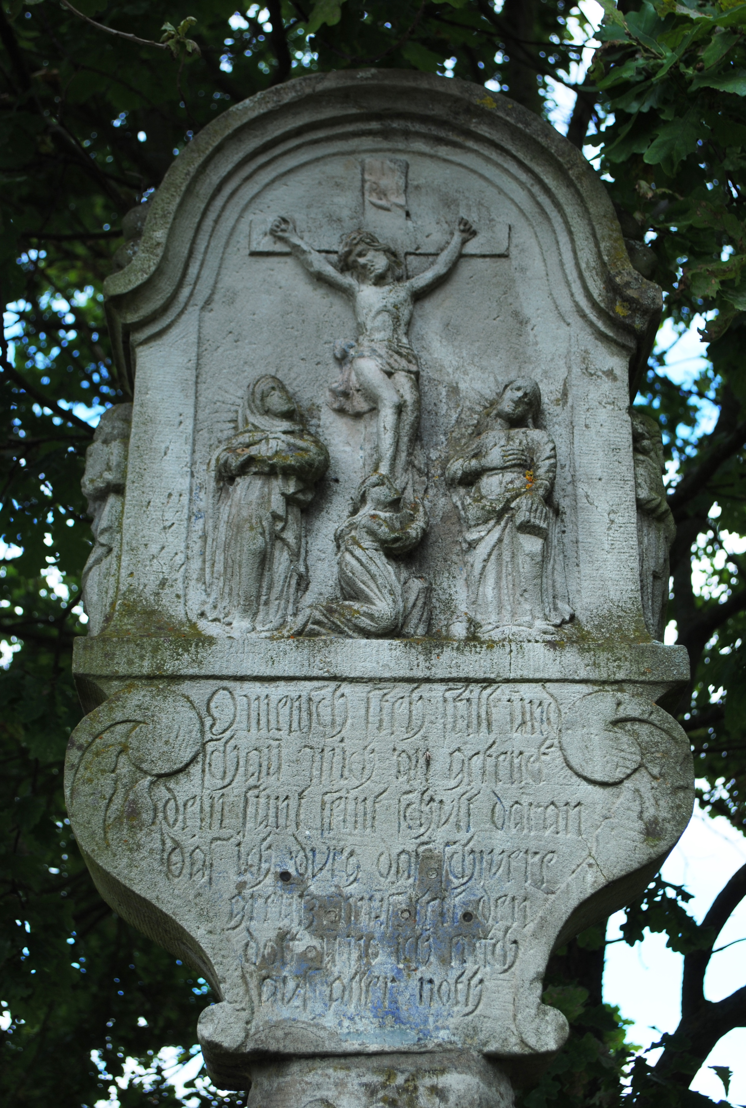 Bildstock, Kreuzigung, Grund, NeusetzThis is a photograph of an architectural monument.